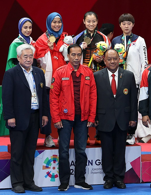 مرجان سلحشوری در مسابقات تکواندو پومسه، بازی‌های آسیایی جاکارتا ۲۰۱۸